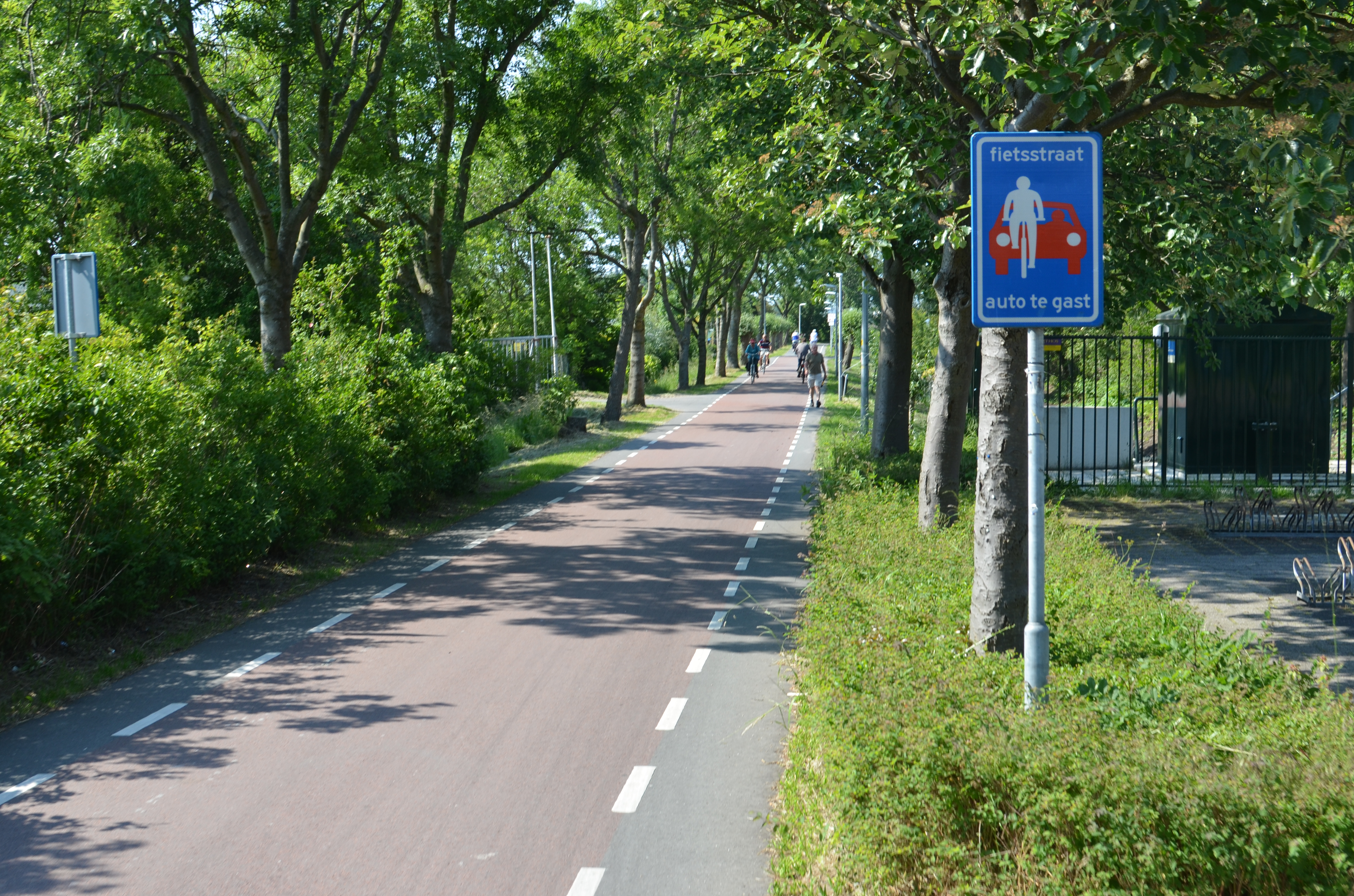 Een fietsstraat in Voorschoten.